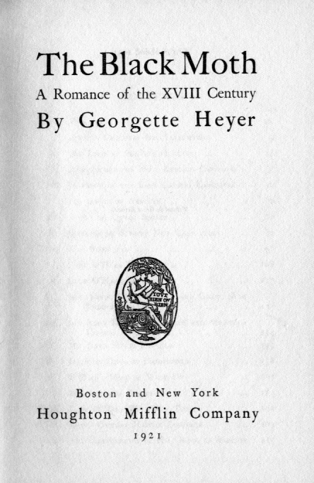 Première page du premier roman de l'écrivain anglais Georgette Heyer (1902-1974) : The Black Moth. Il est dans le domaine public. Boston and New York : Houghton Mifflin Company, 1921.